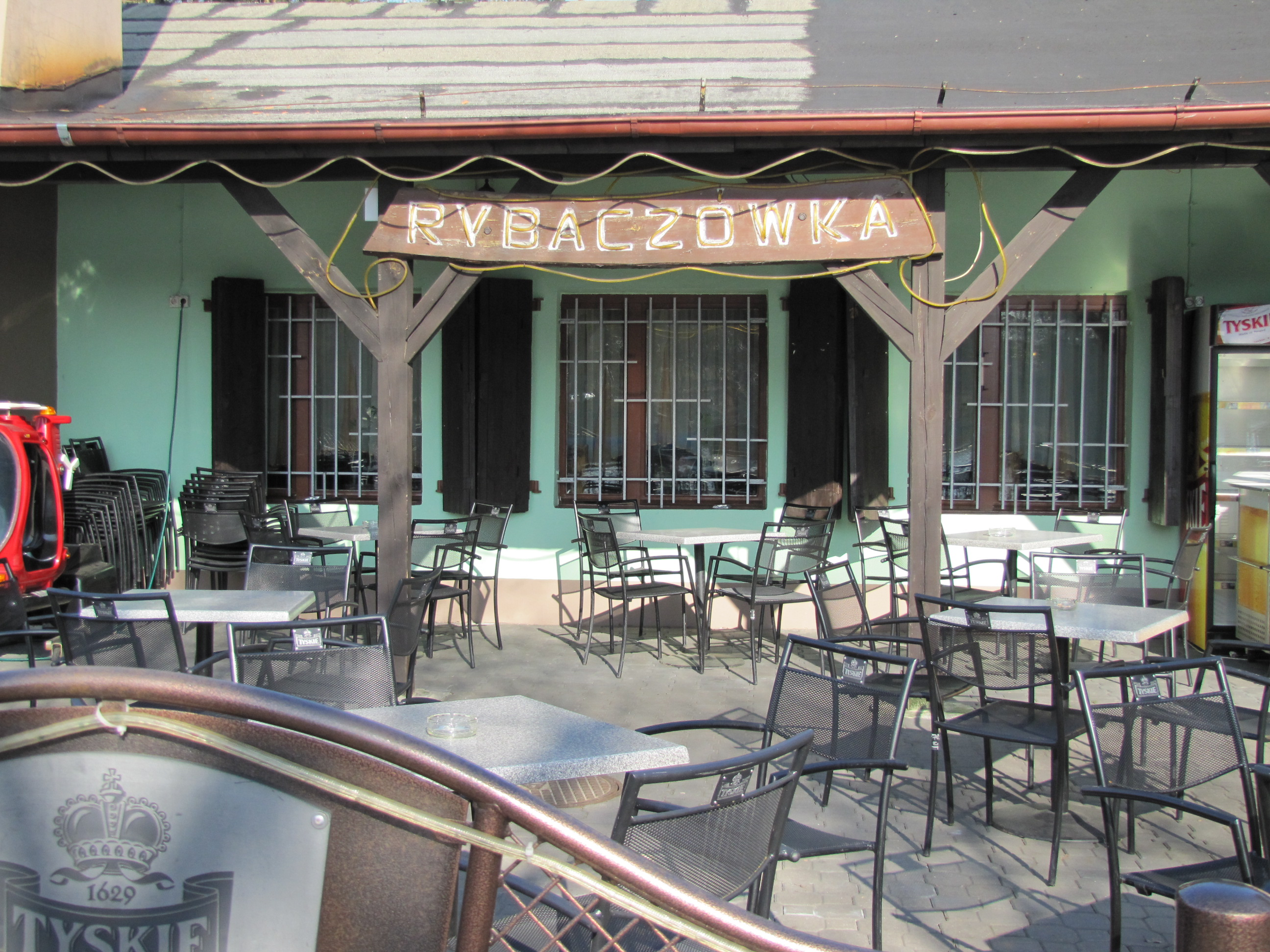 Rybaczówka.